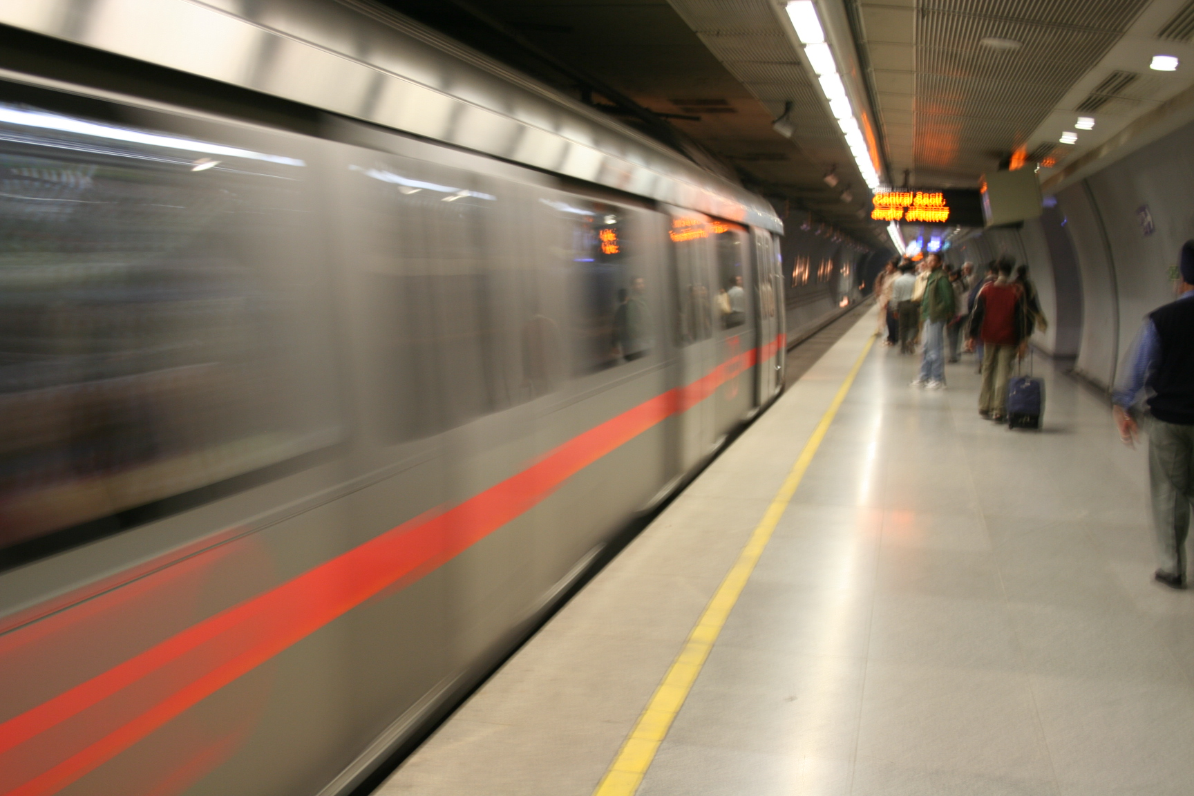 Central Secretariat Delhi Metro